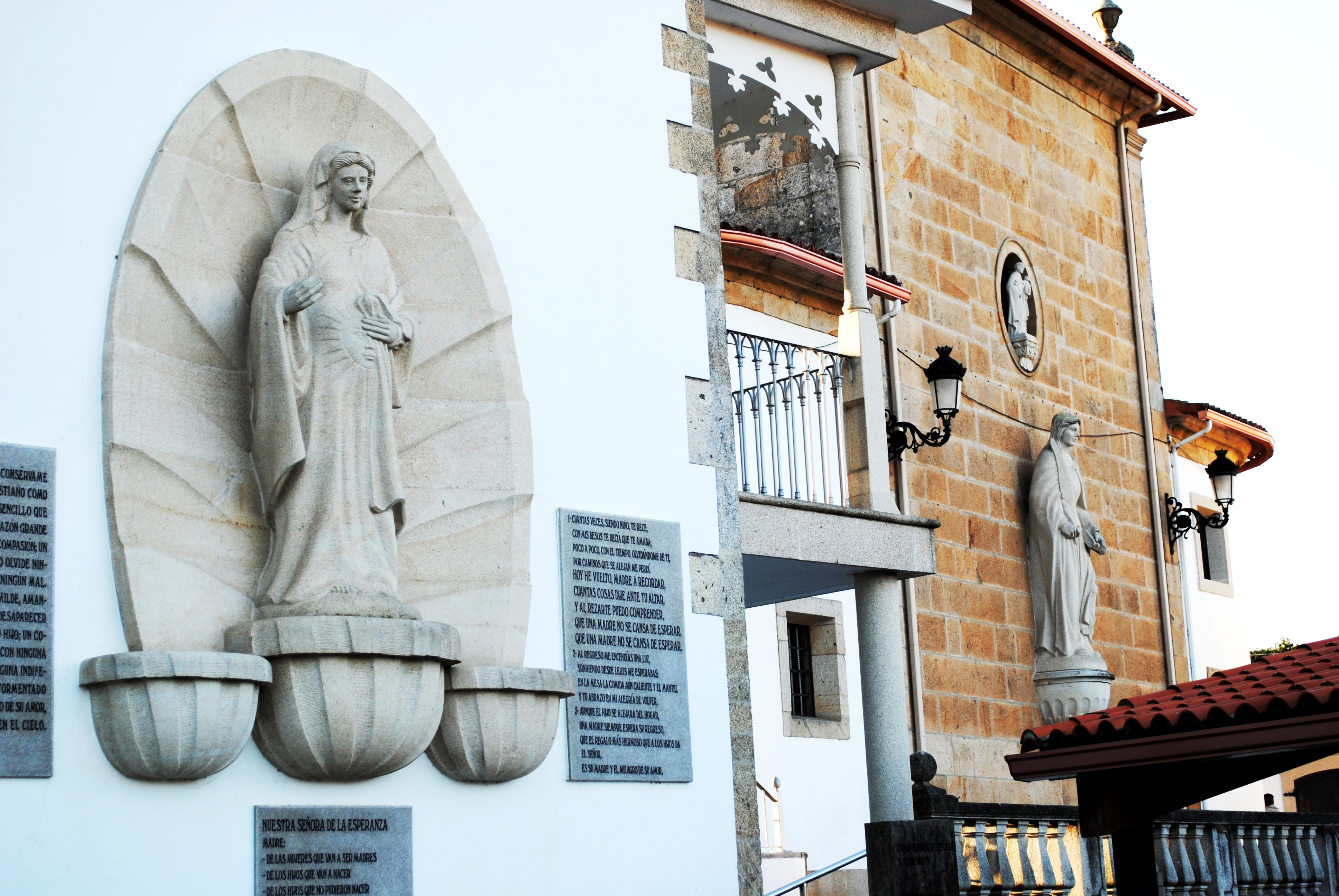 S. Martiño e S. Campio de Figueiró, ábsida